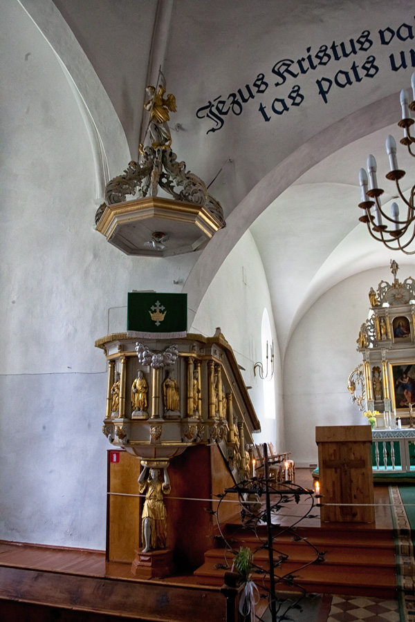 Kancele, Kuldīga, Baznīcas iela 33